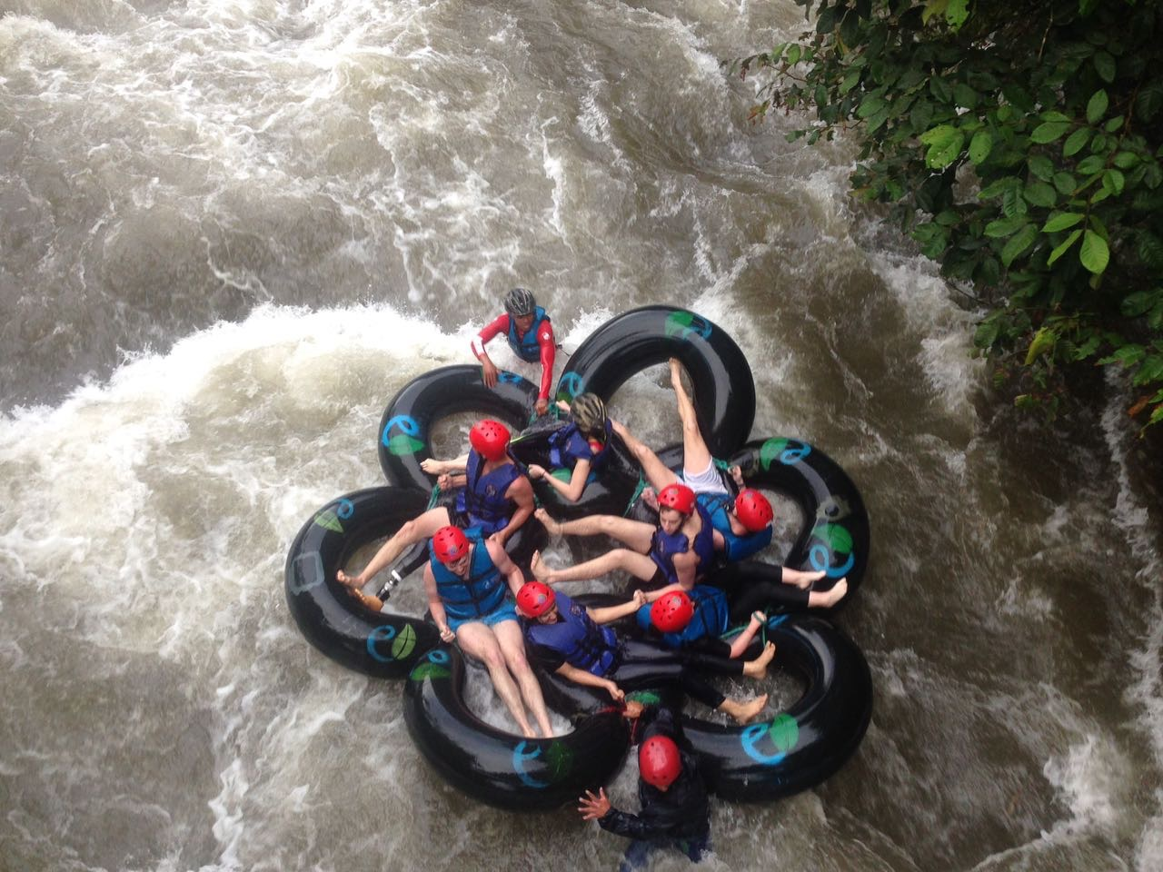 RIO MINDO